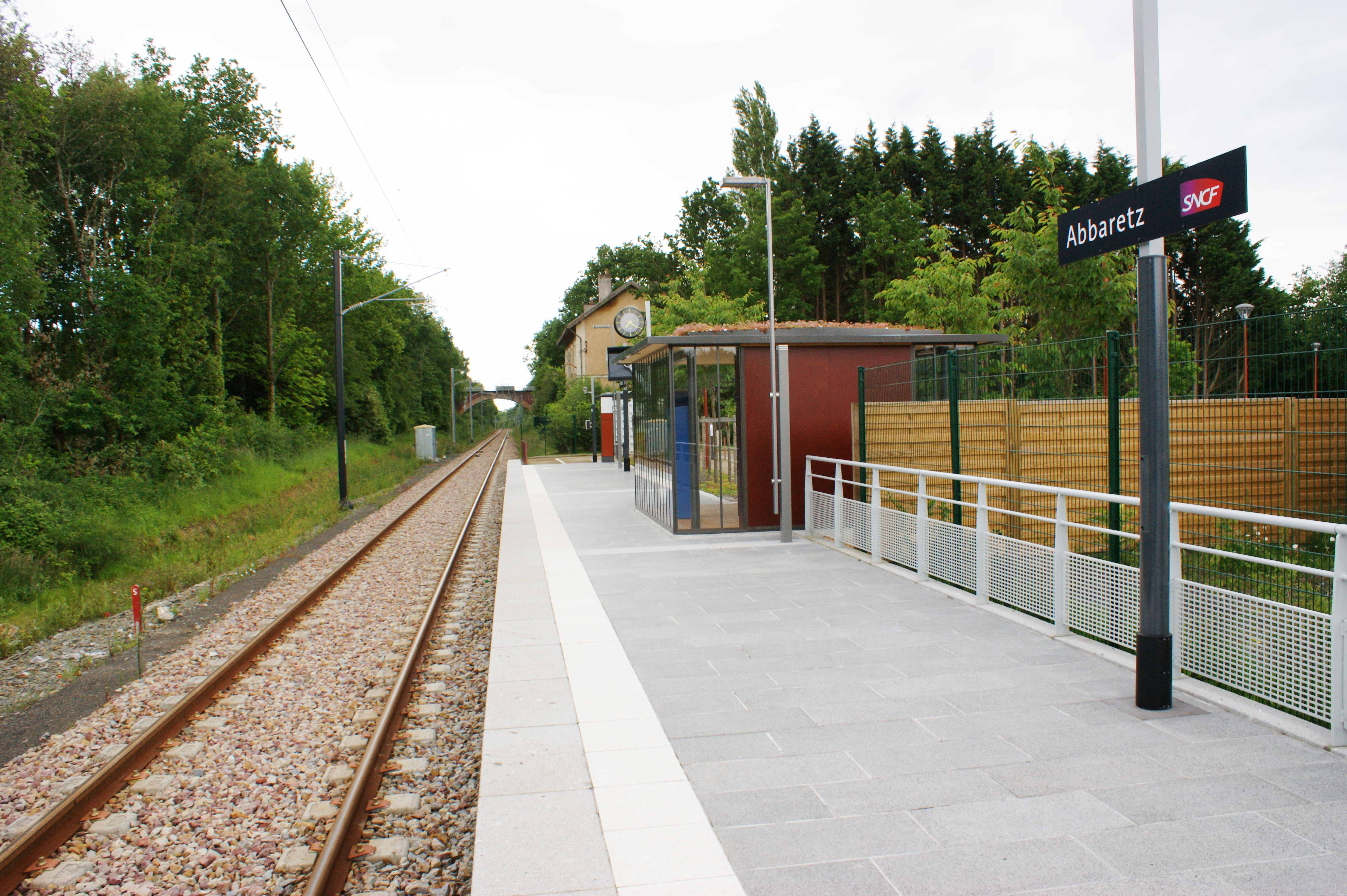 Gare d'Abbaretz, la halte et la voie en direction de Châteaubriant.